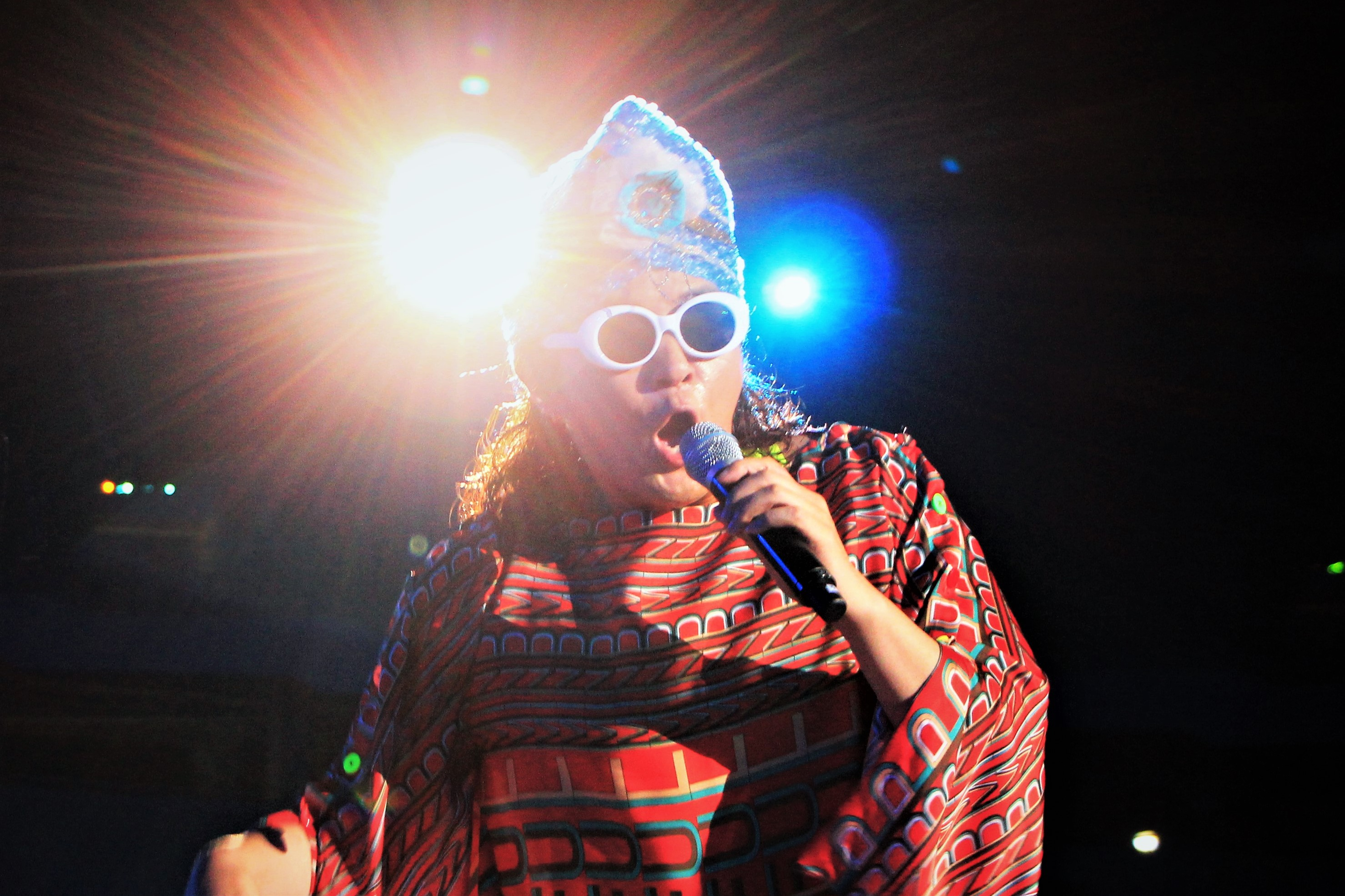 전국체육대회 폐막식 현장을 찾아 공연한 노라조 조빈.